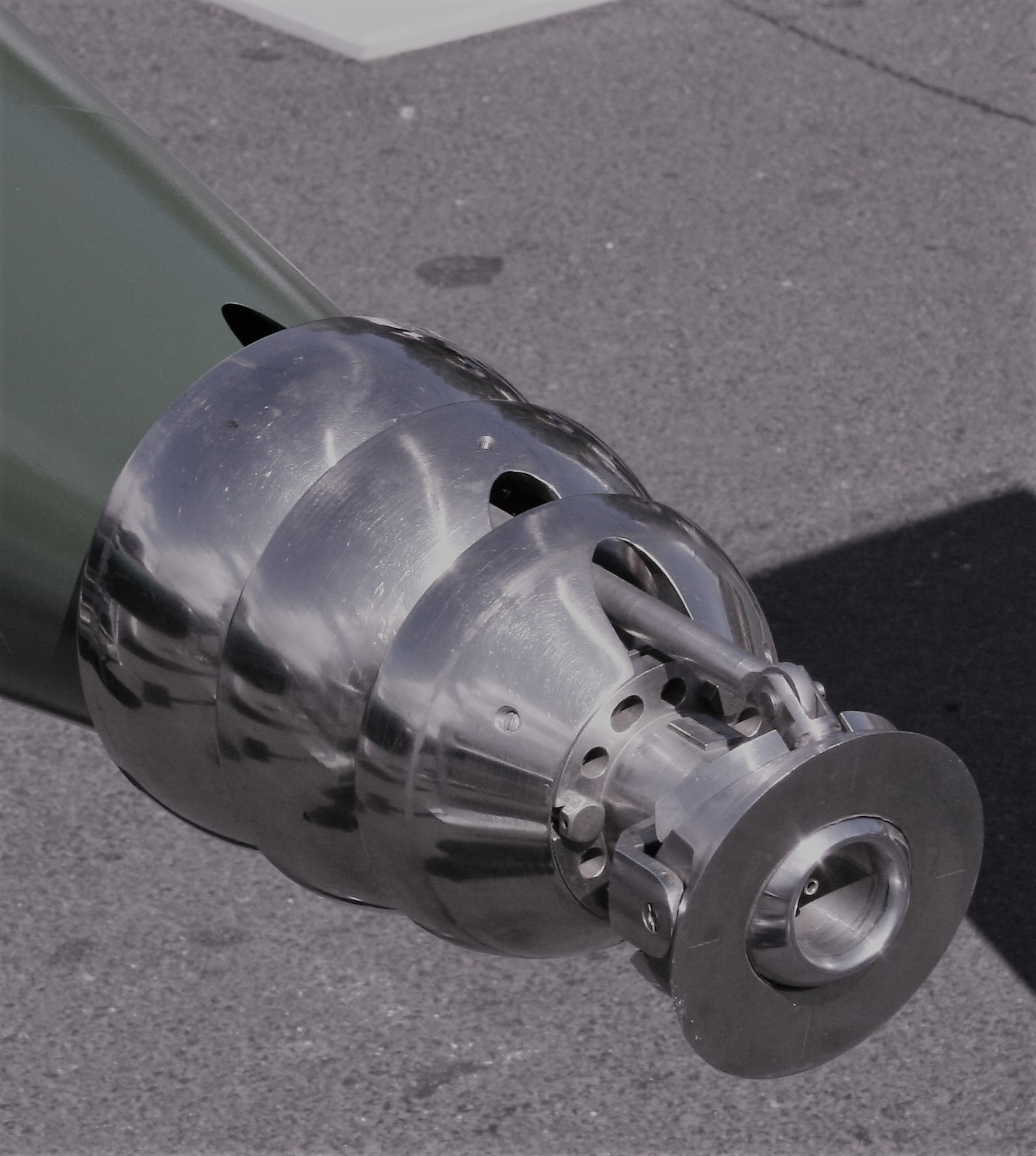 Głowica superkawitacyjna torpedy WA-111 Szkwał